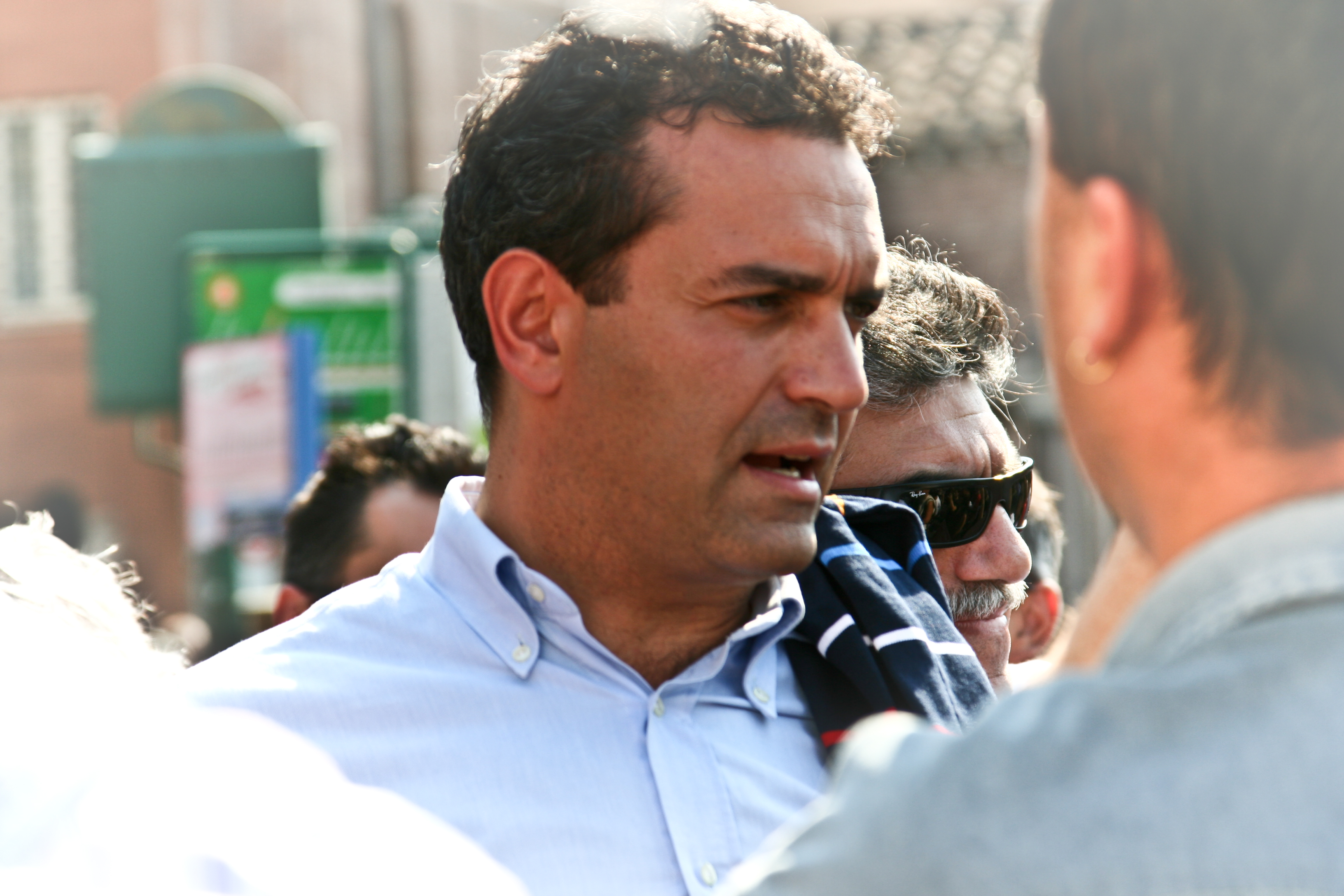 Luigi de Magistris - Roma 26 Settembre 2009 - Manifestazione delle Agende Rosse